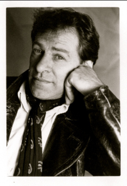 Henk Uterwijk - foto van Serge-Henri Valcke